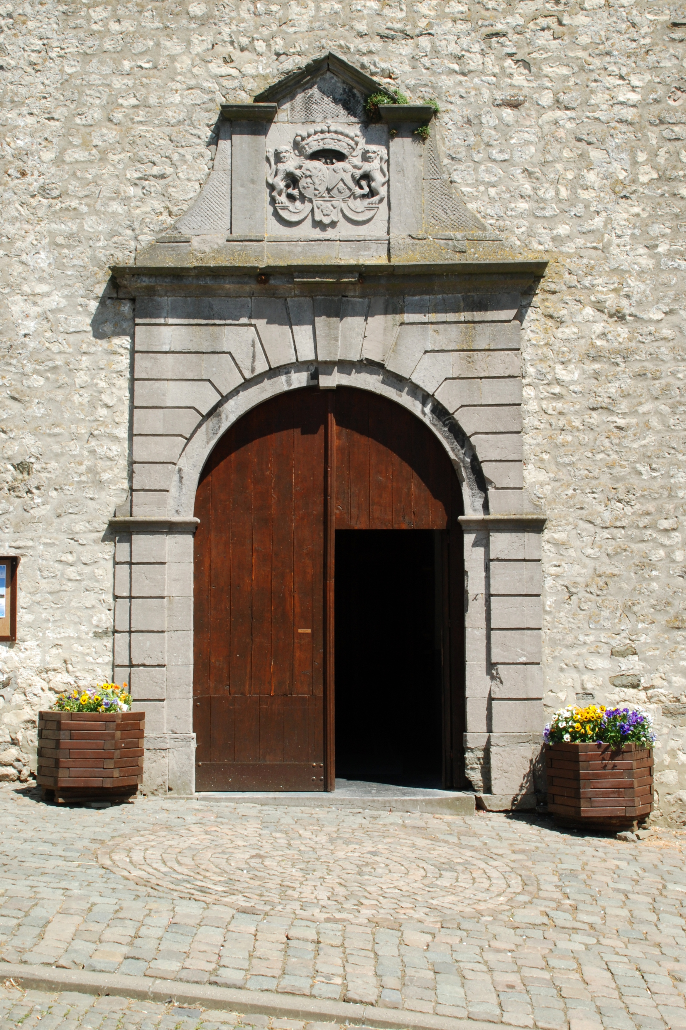 Belgique - Bousval - Saint-Barthélémy - portail de style classique